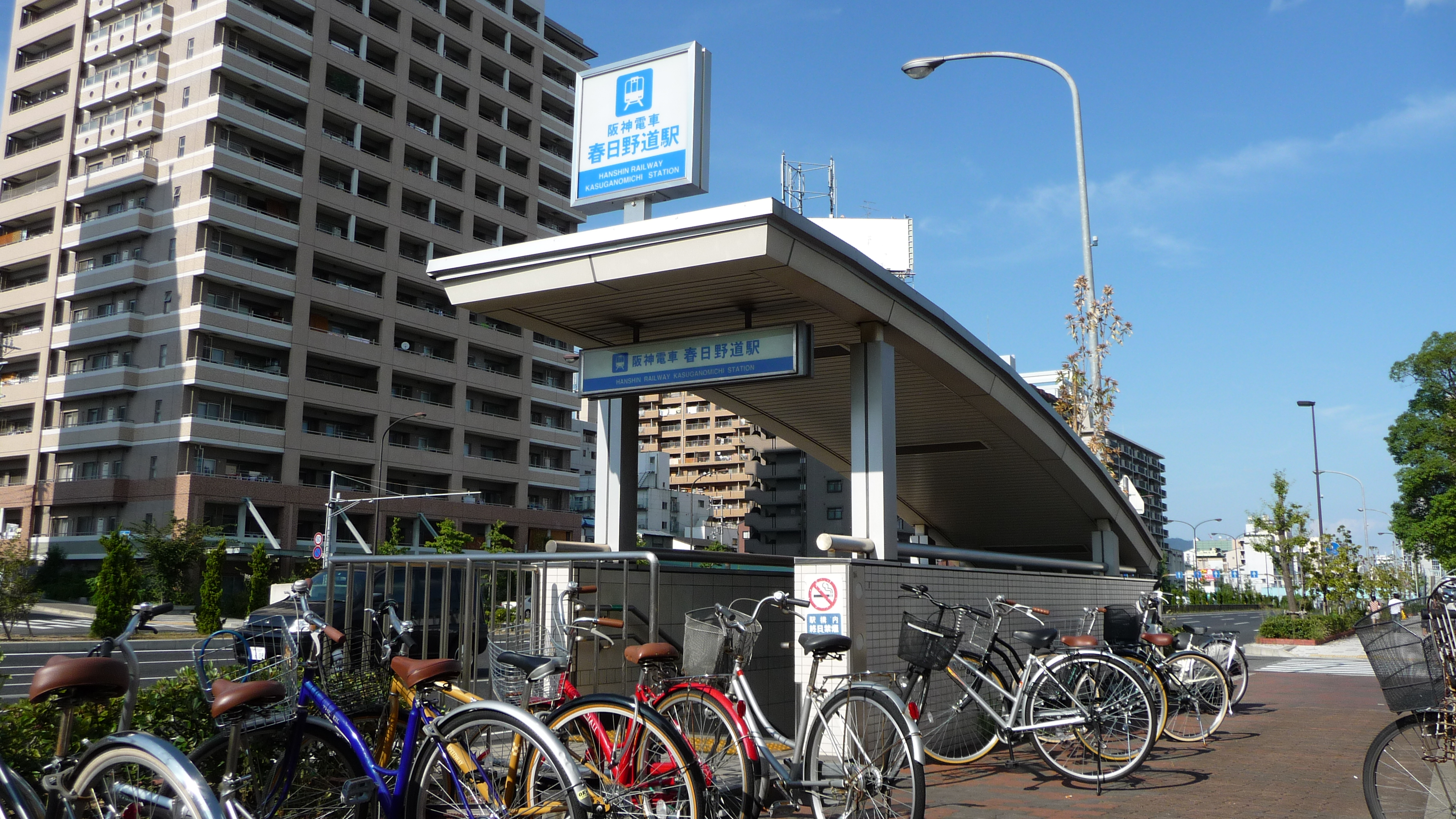 阪神春日野道駅